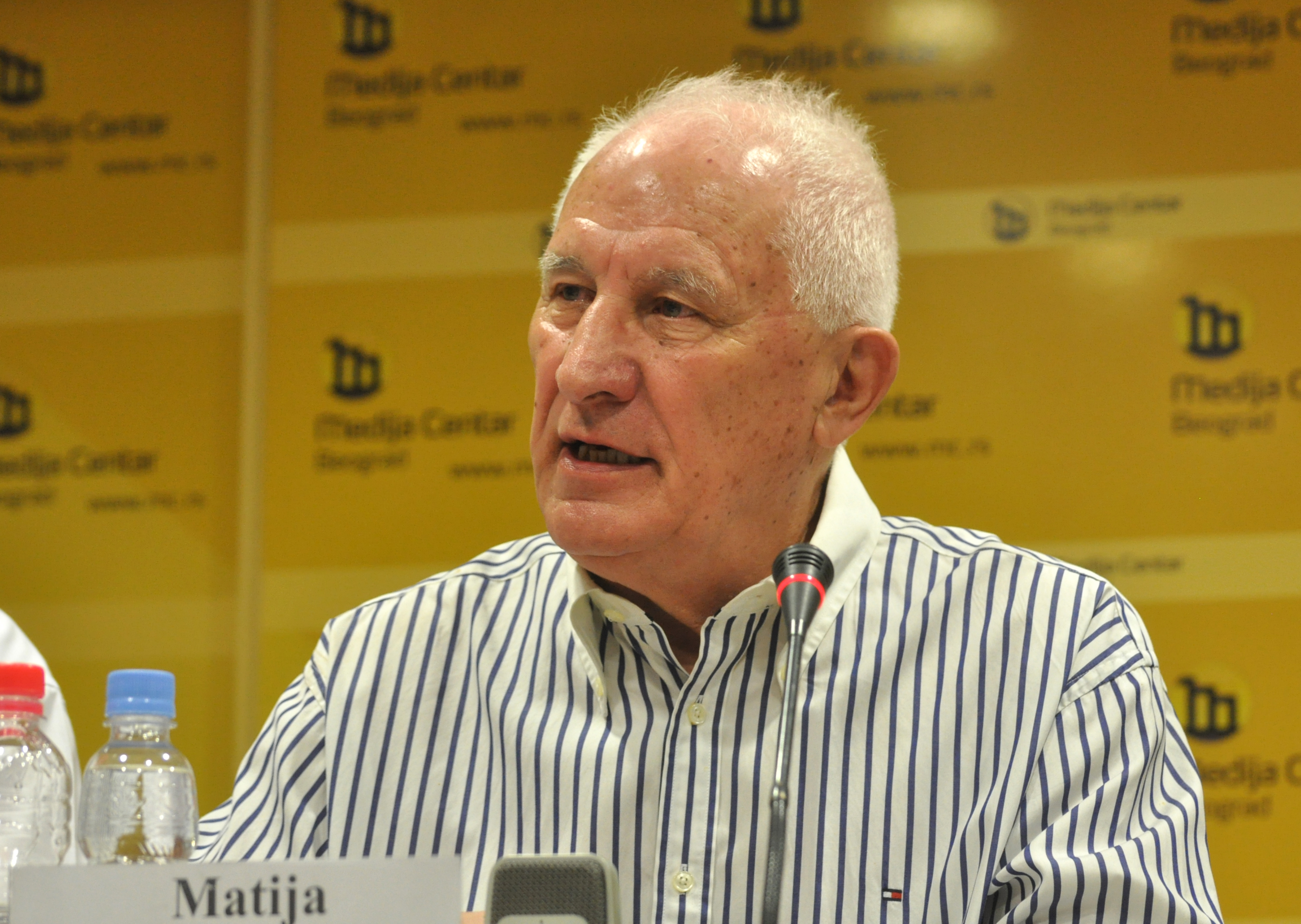 Matija Bećković 2015